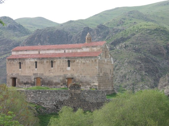 церковь ЦицернаванкAzərbaycanca: Ağoğlan monastırı